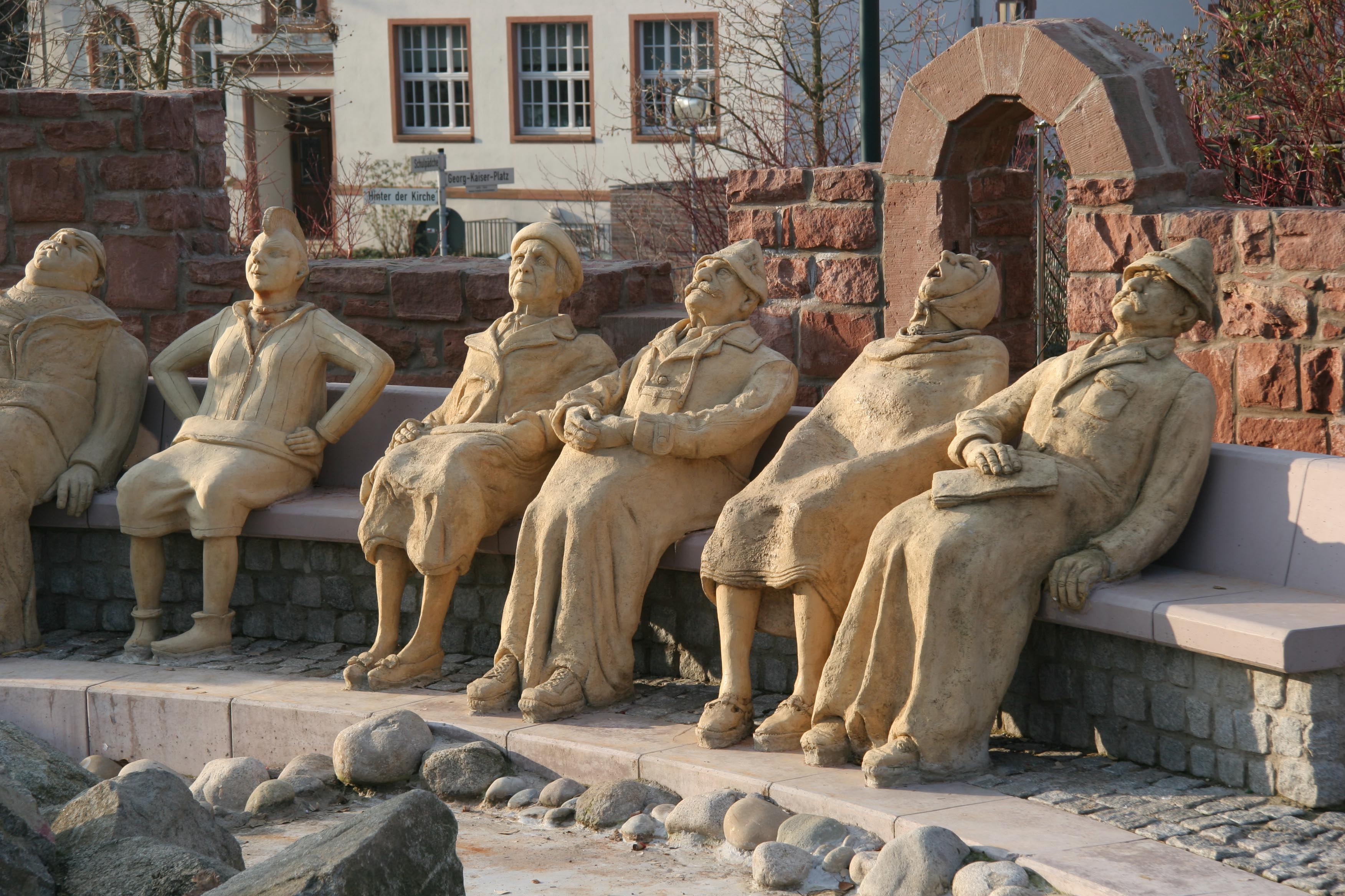 Skulpturengruppe nahe dem Rathaus in Seeheim